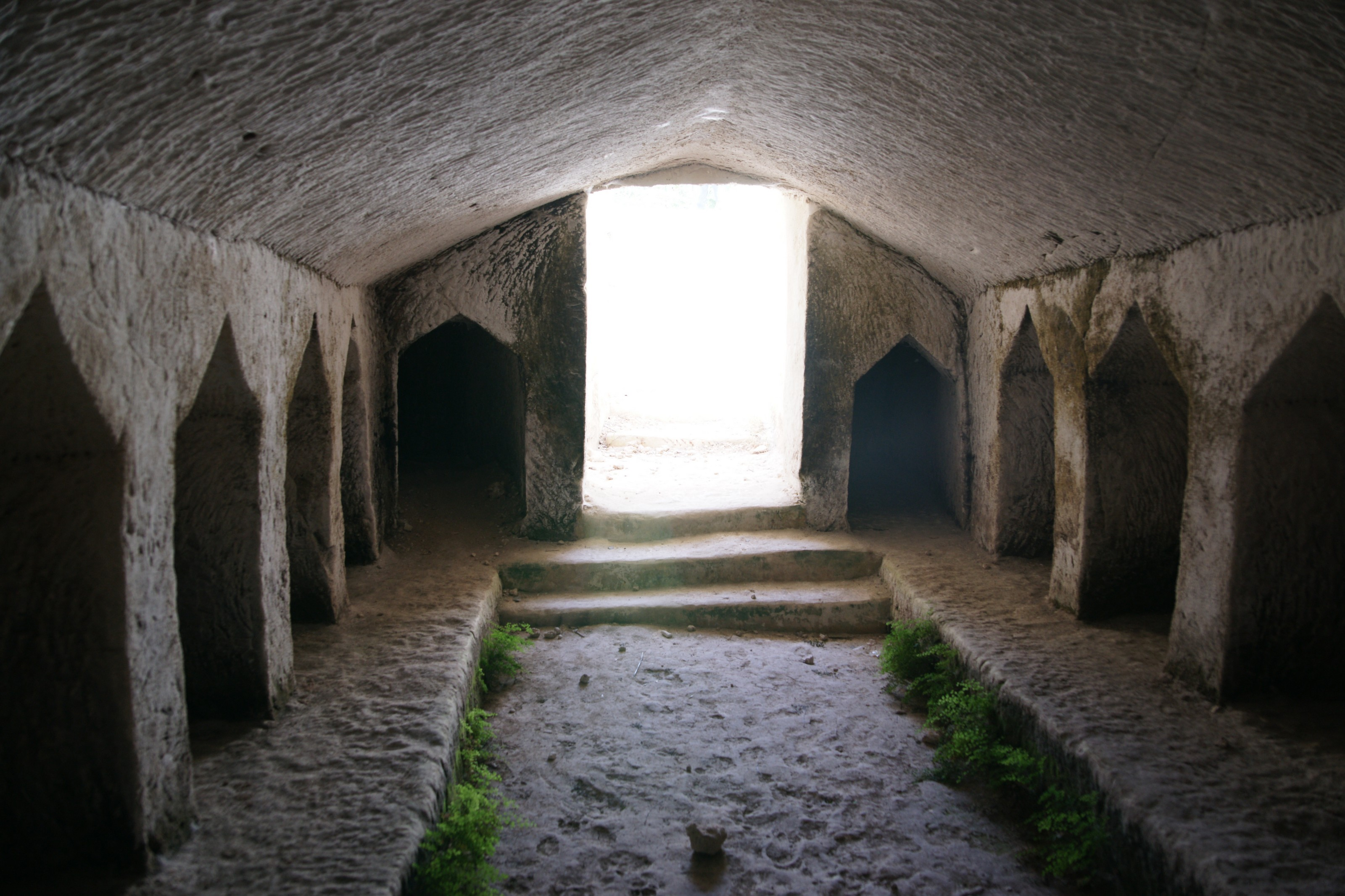 Maresha: Northern Cemetery (Nordfriedhof), Innenansicht mit Nischengräbern